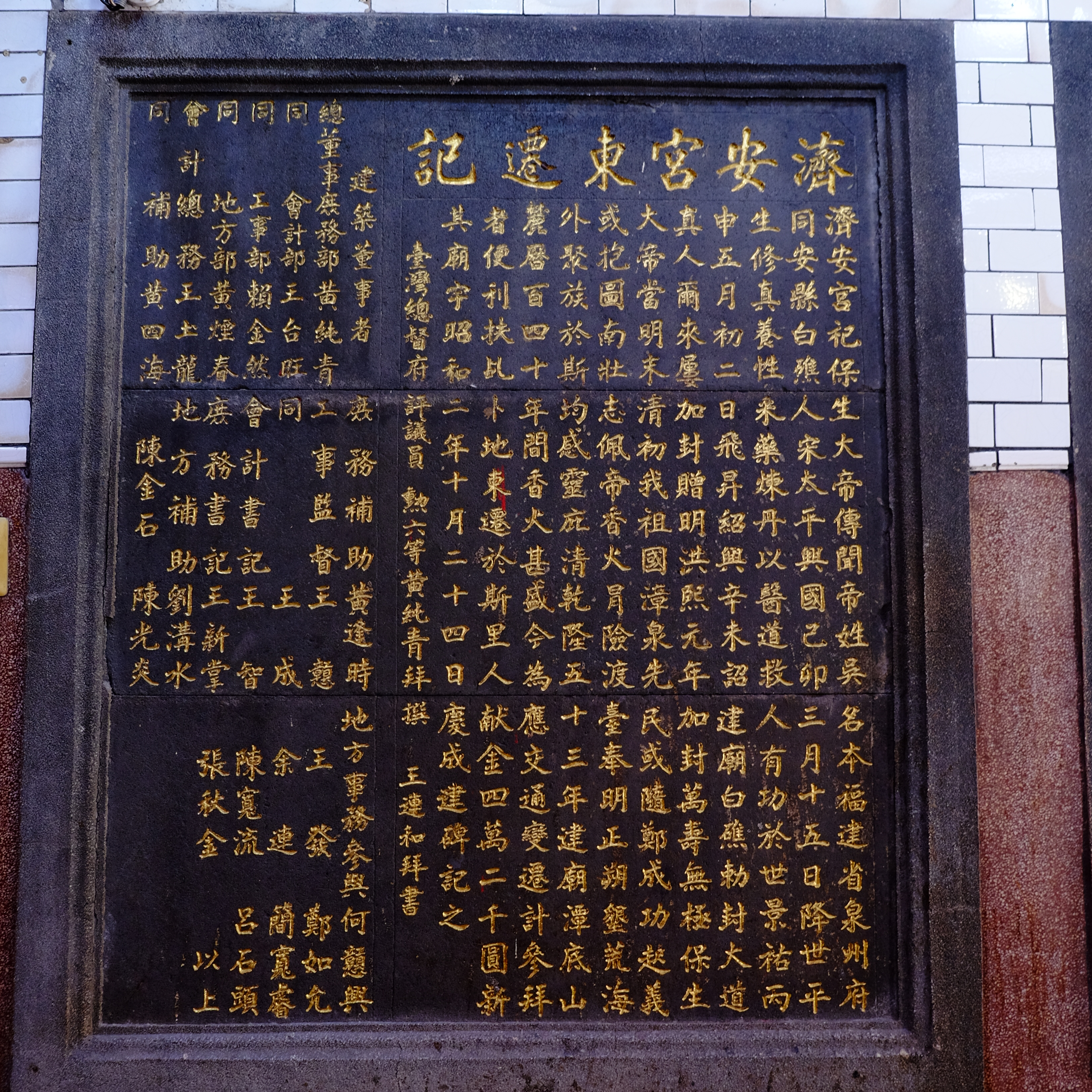 ShuLin JiAn Temple 濟安宮東遷記碑 2018